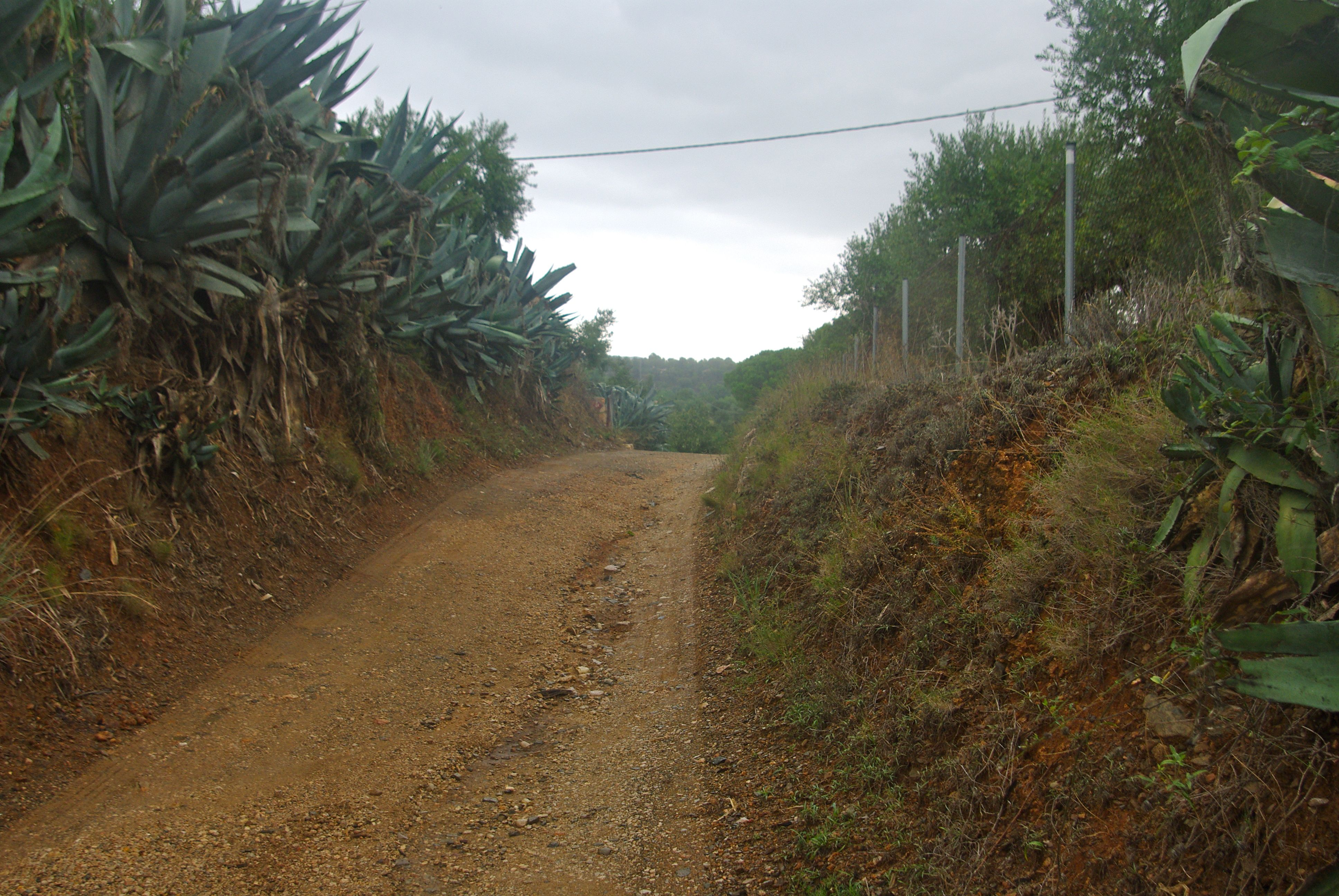 El camí de Riudoms a castellvell després d'atravessar el camí de la Pedrera del Coubi, al terme de Reus